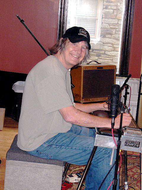 Dan Dugmore